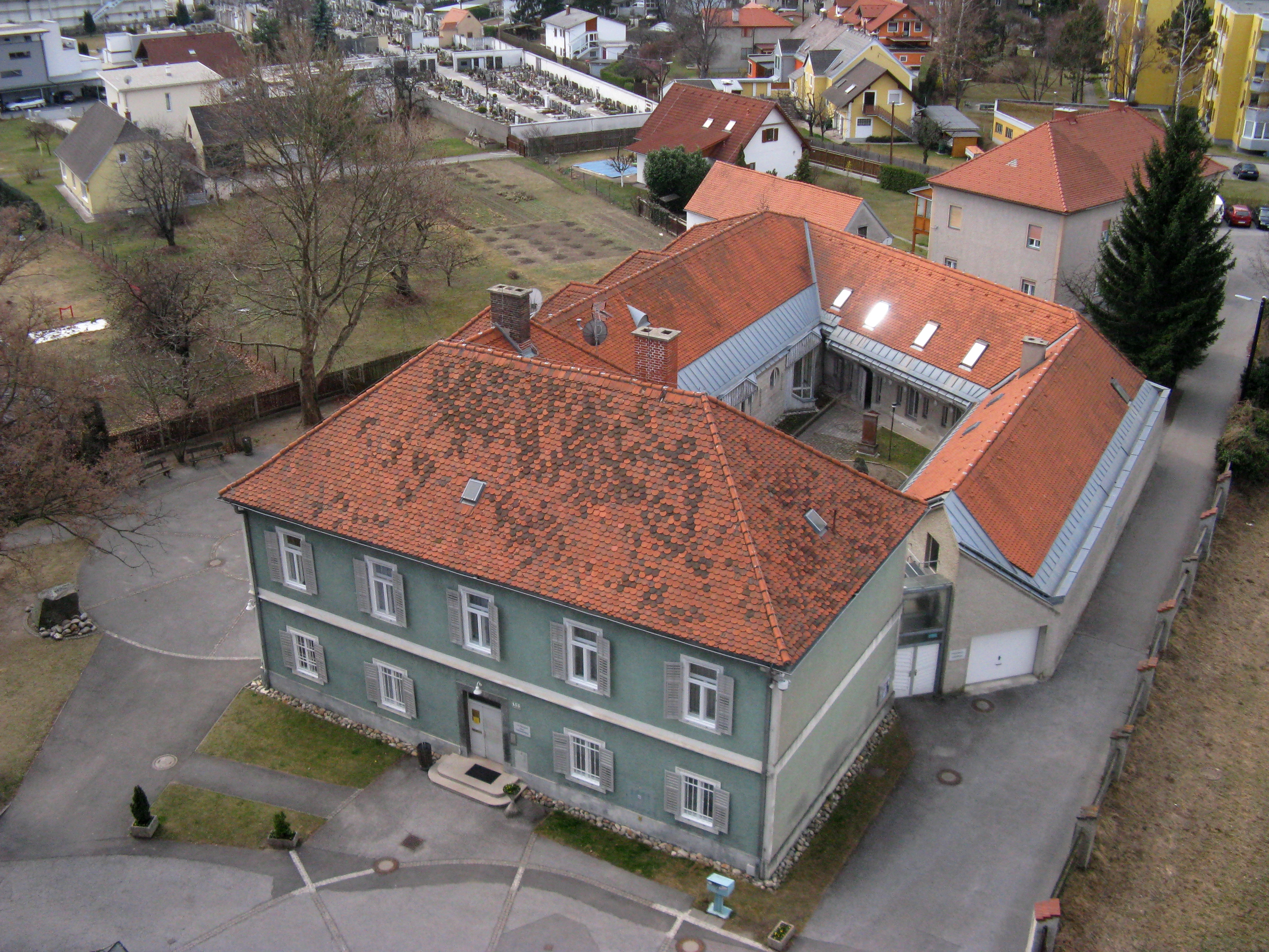 Pfarrhof